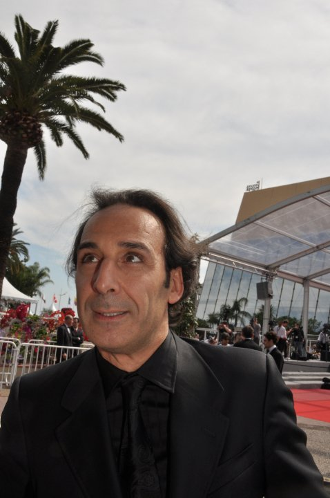 Alexandre Desplat Inarritu au festival de Cannes